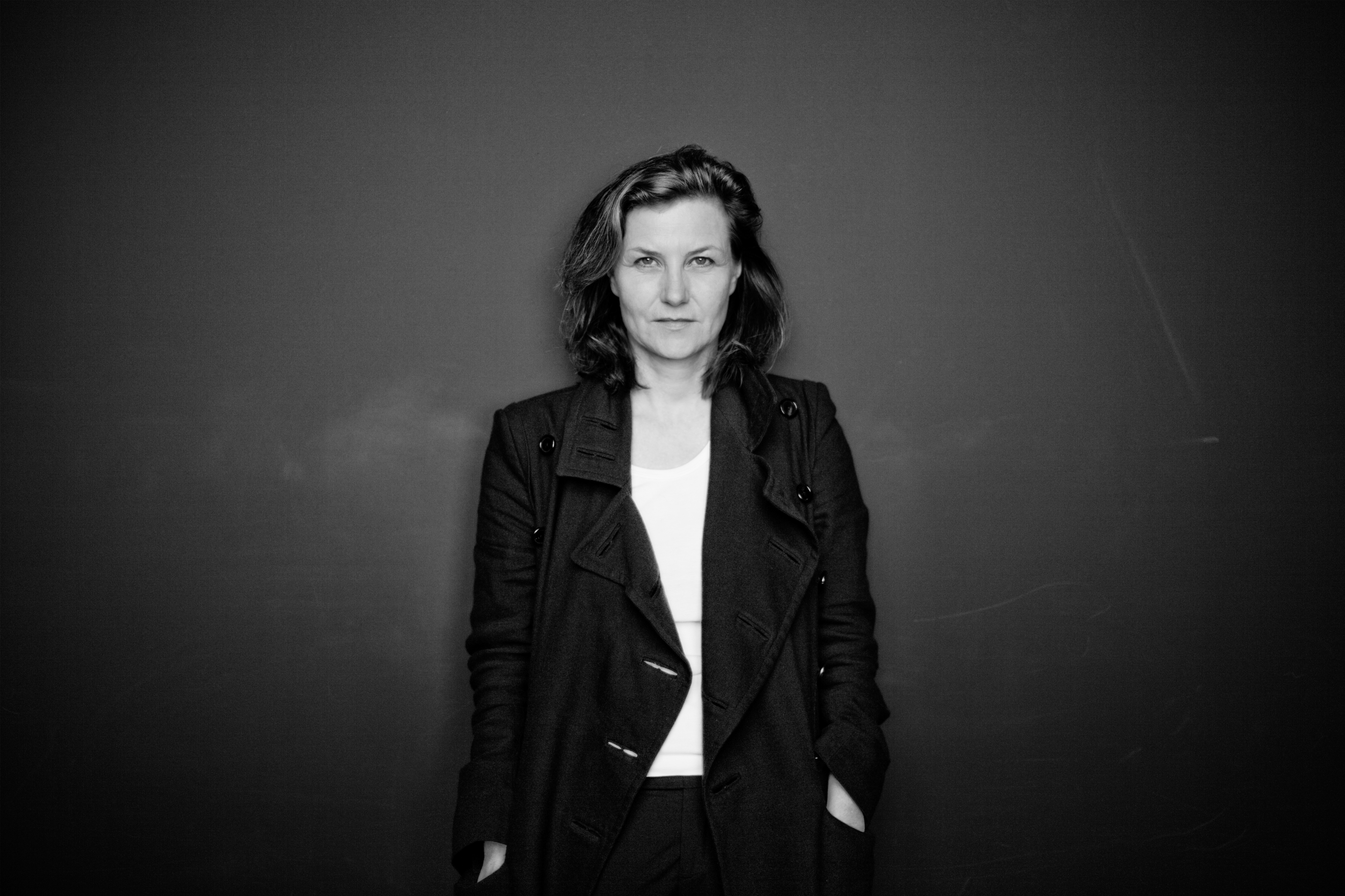 portrait_jk